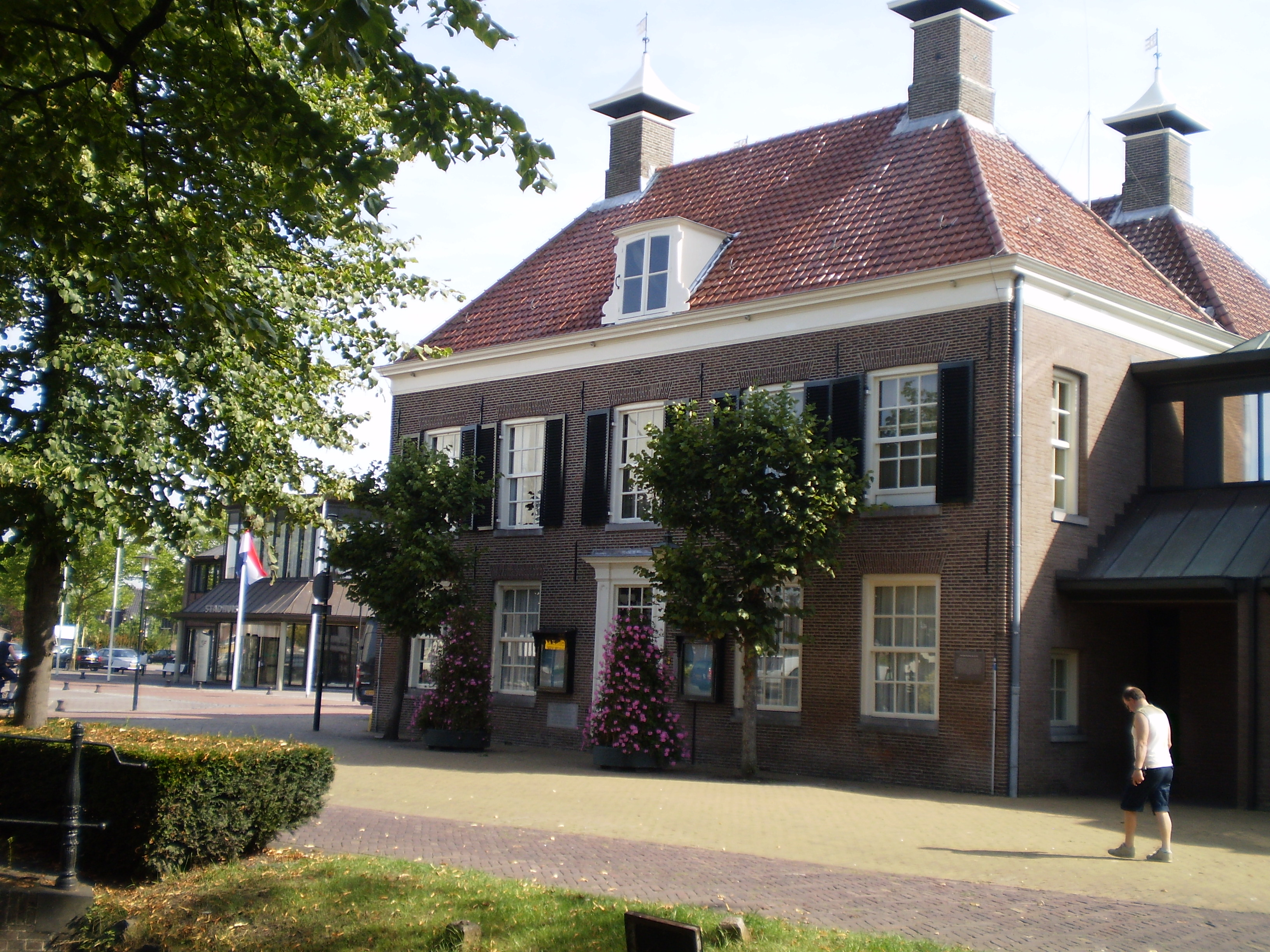 Gemeentehûs Nijkerk.